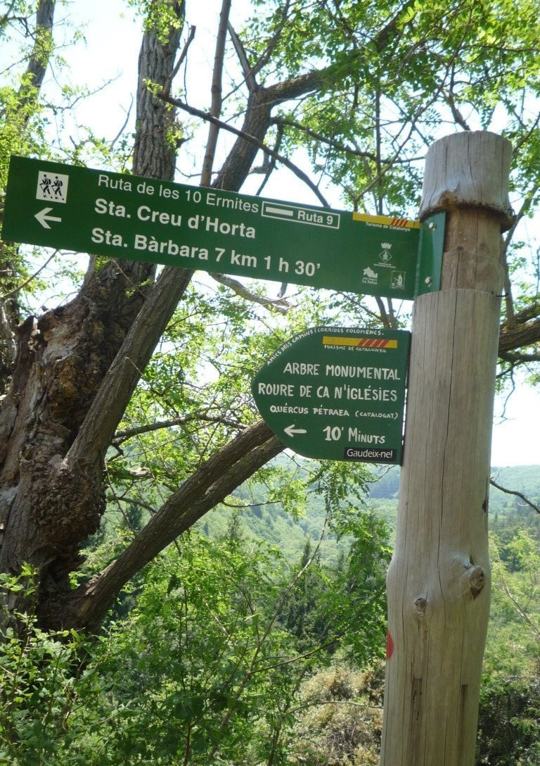 Detall de la senyalització que podem trobar en tota la ruta